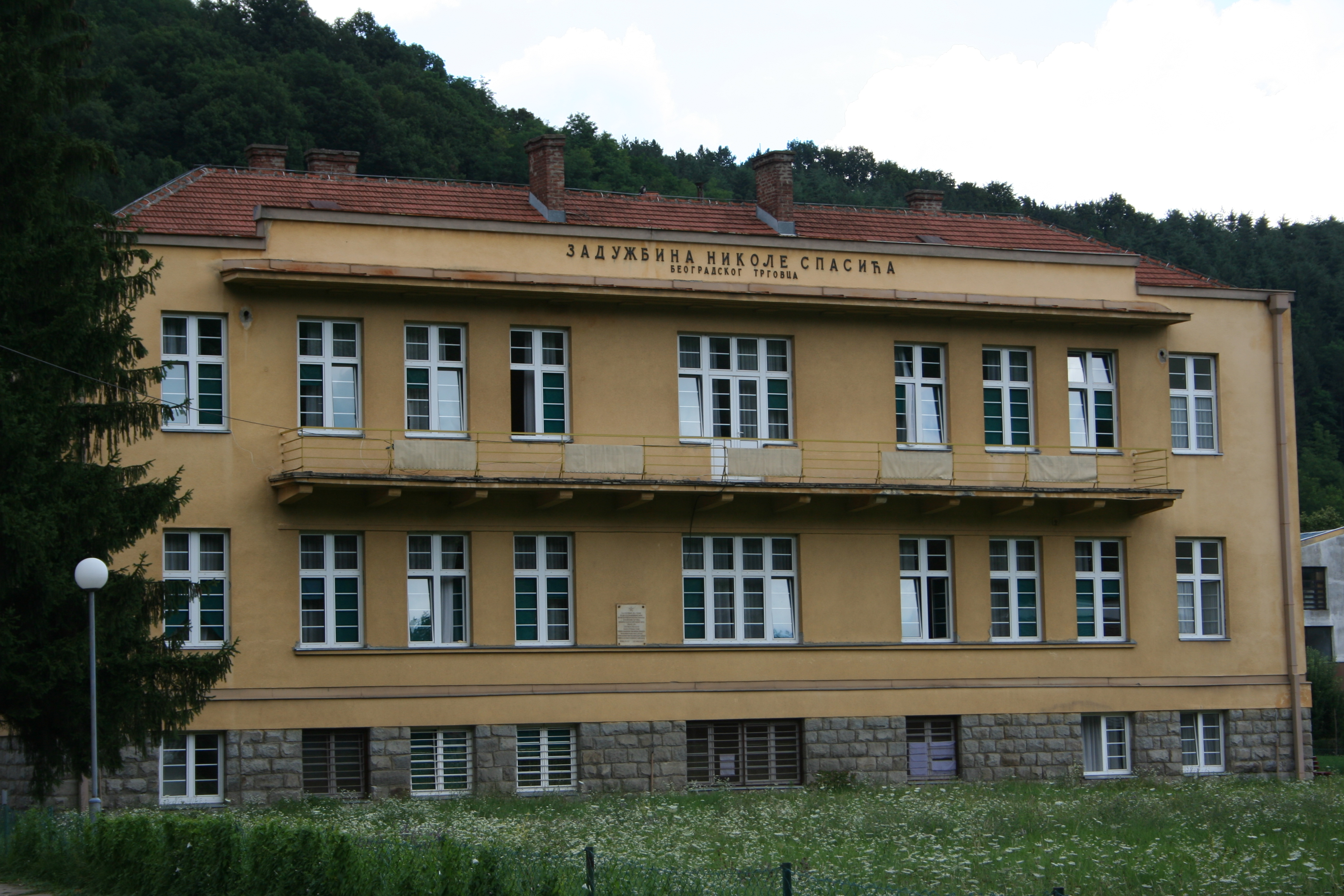 Zgrada bolnice, Krupanj - zadužbina Nikole Spasića, trgovca iz Beograda